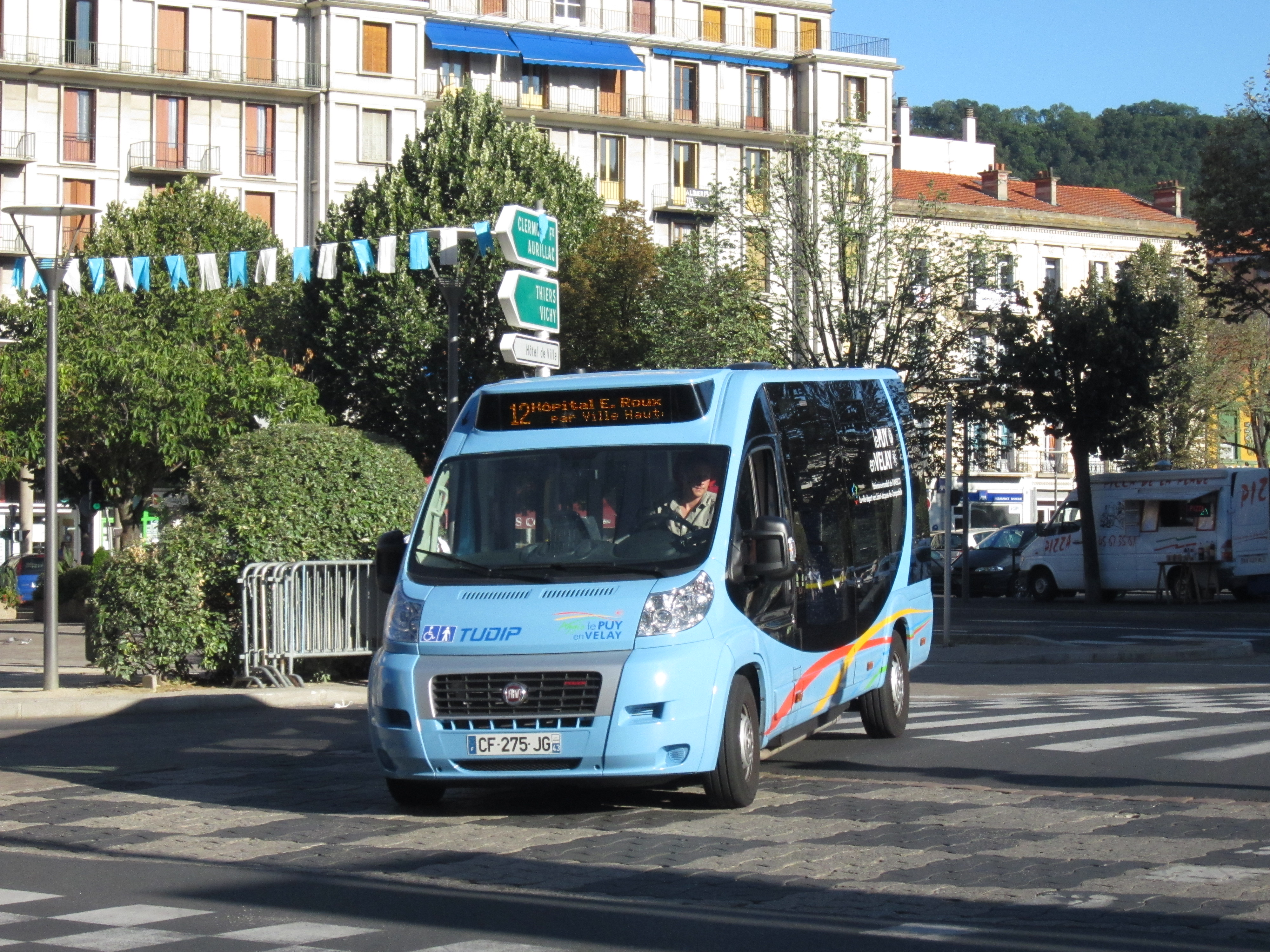 Fiat Ducato de la ligne 12 du réseau TUDIP au Puy-en-Velay, à proximité de la Place Michelet.